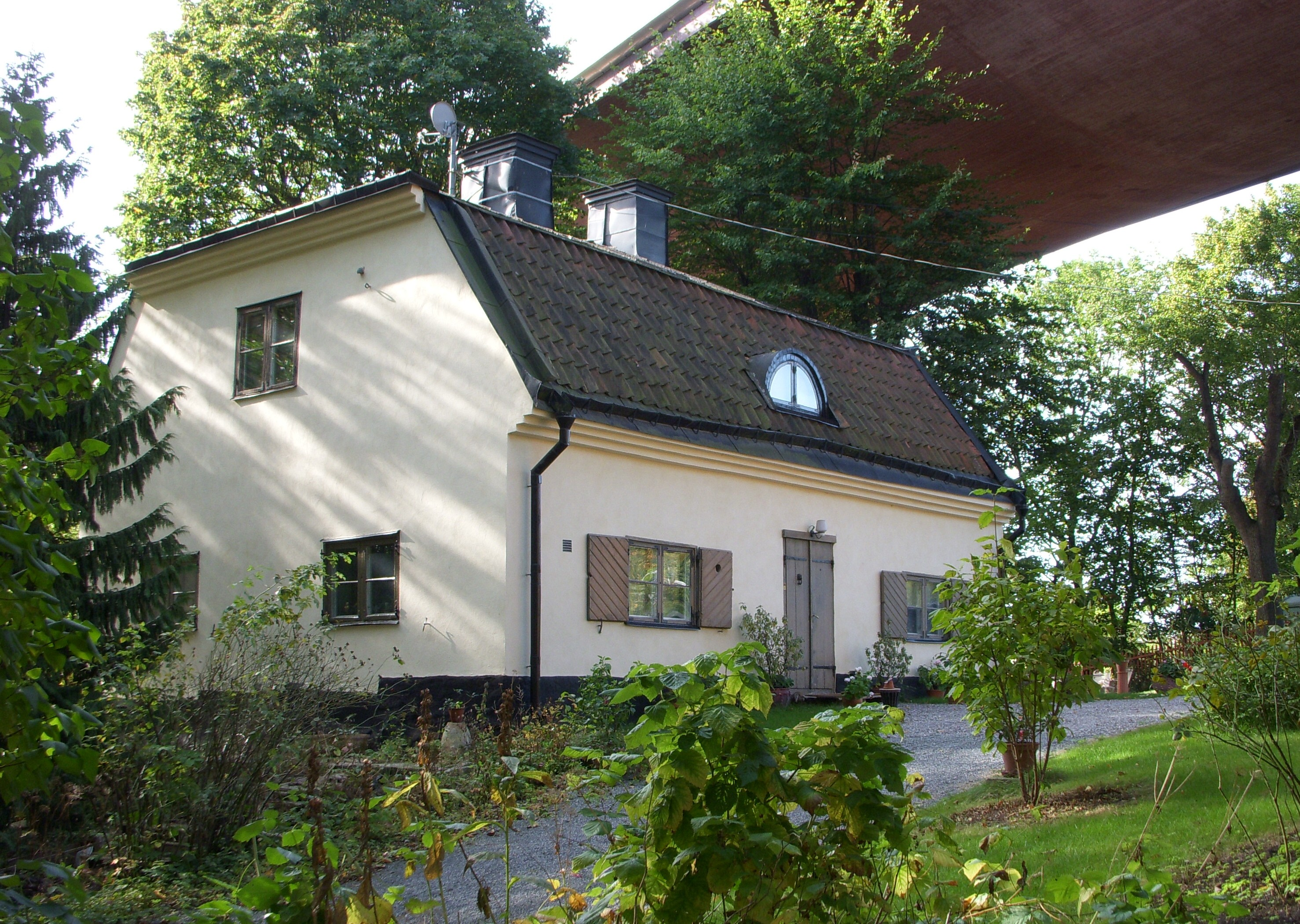 Molitors malmgård på Södermalm, huvudbyggnad